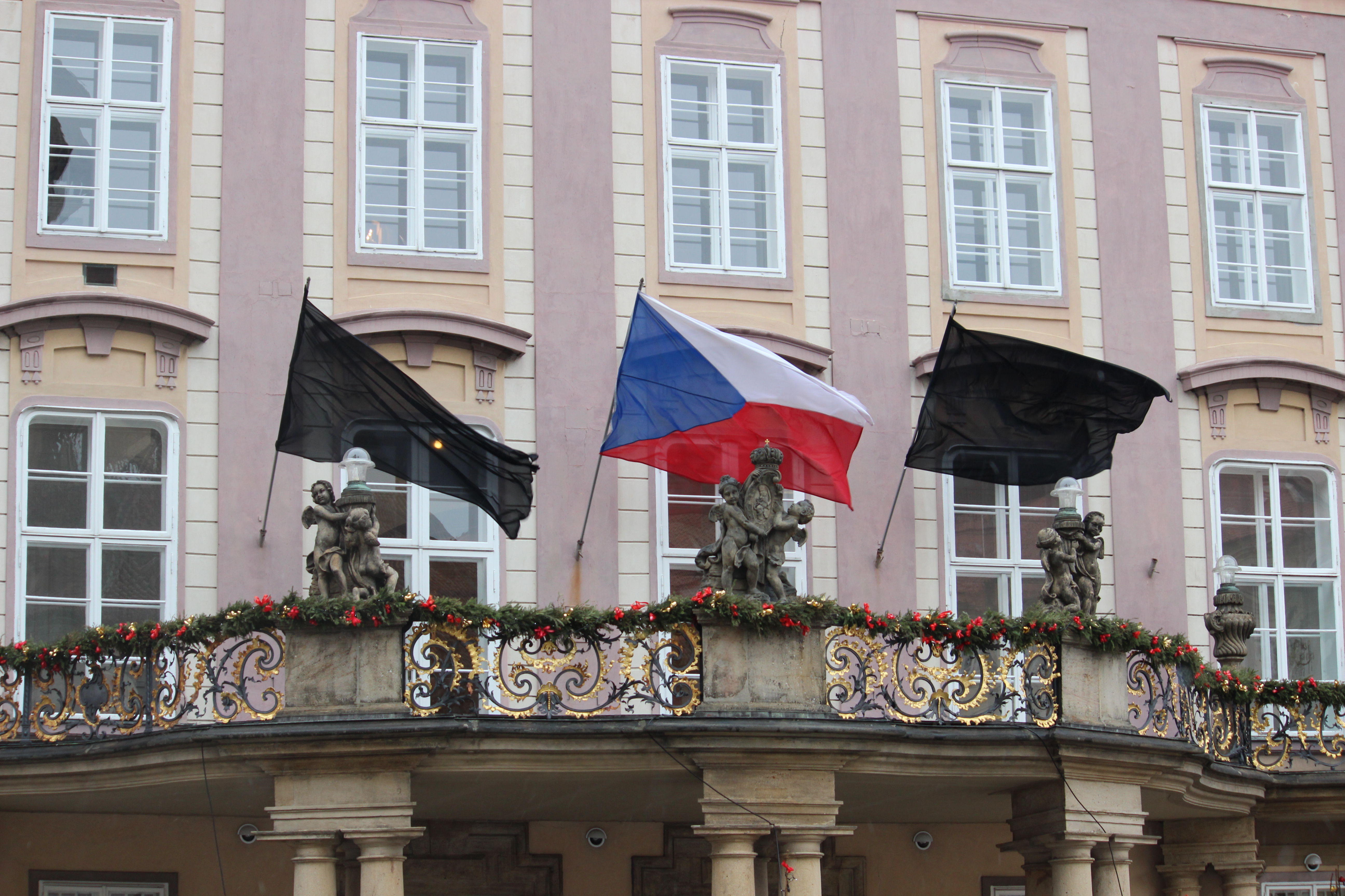 Ve středu 21. 12. 2011 byla rakev s ostatky Václava Havla přemístěna z Pražské křižovatky do Vladislavského sálu Pražského hradu. This photograph was taken with a DSLR from WMCZ's Camera grant.